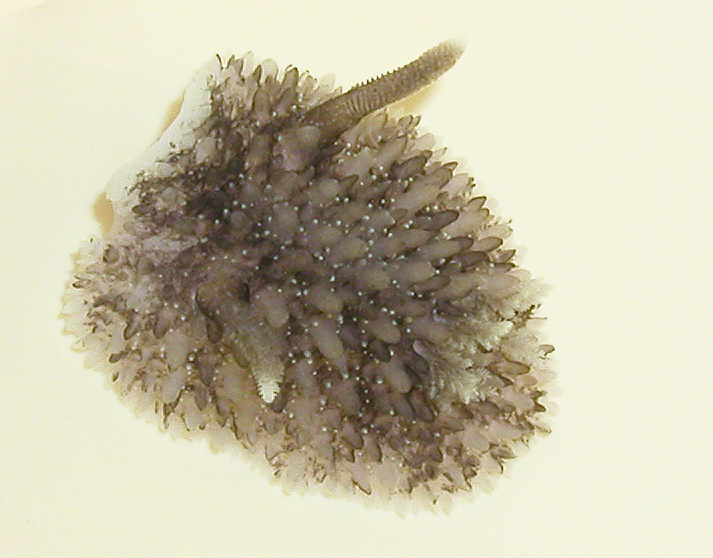 Acanthodoris brunnea, a 12 m de profundidad, en Monterey, EE.UU.